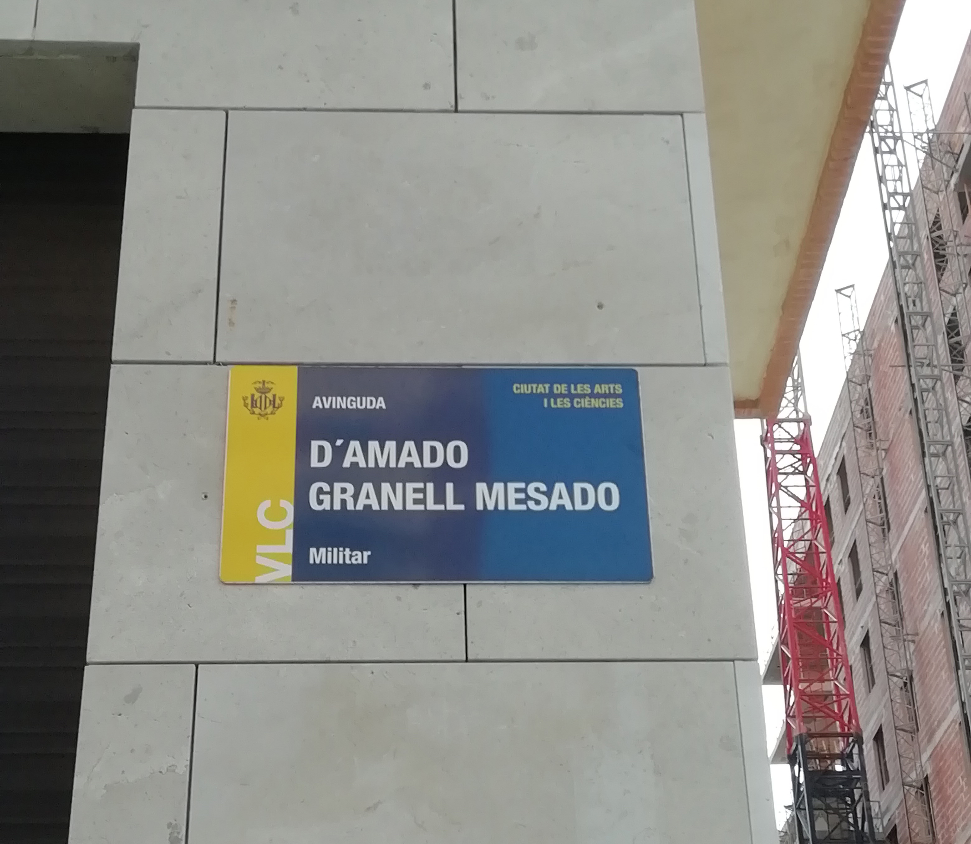 El ayuntamiento de valencia mantuvo durante un año la rotulación con el nombre anterior de la avenida y con el de Amado Granell. Pasado este tiempo se colocaron las placas en las que sólo figura el nombre de amado Granell.